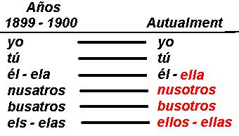 Os pronombes personals de l'aragonés enna balle de Bio. Comparazión d'os que recopiló Jean Joseph Soraïhandy en os años 1899-1900, e d'os que s'empregan autualment. D'alcuerdo con as normas ortograficas de Uesca de 1987.